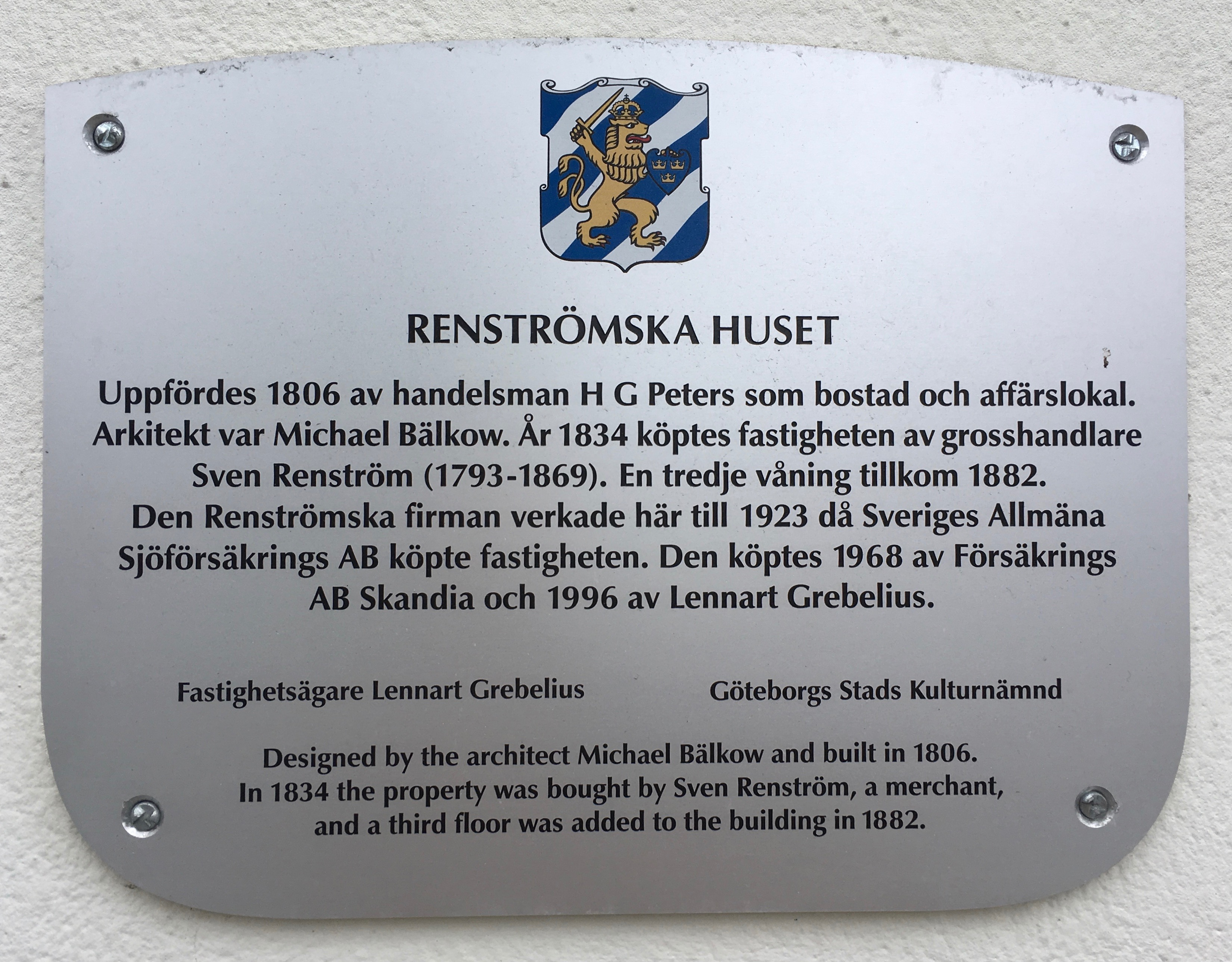 Plakett vid Renströmska huset i Göteborg. Plaketten sattes upp som en del av Göteborgs stads kulturnämnds "Projekt Husmärkning" kring åren 2000-2001 där drygt etthundra skyltar ingick (ca 10 skyltar per månad). Se även boken "100 utmärkta hus i Göteborg". Vid en inventering av kommunen gjord 2016 satt 69 skyltar fortfarande uppe.